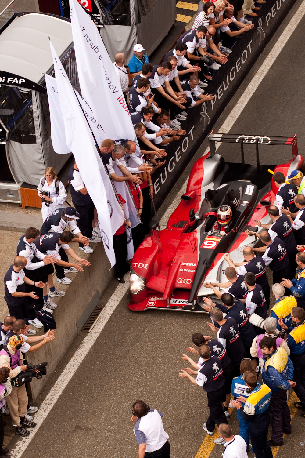 Arrivée de la voiture gagnante.